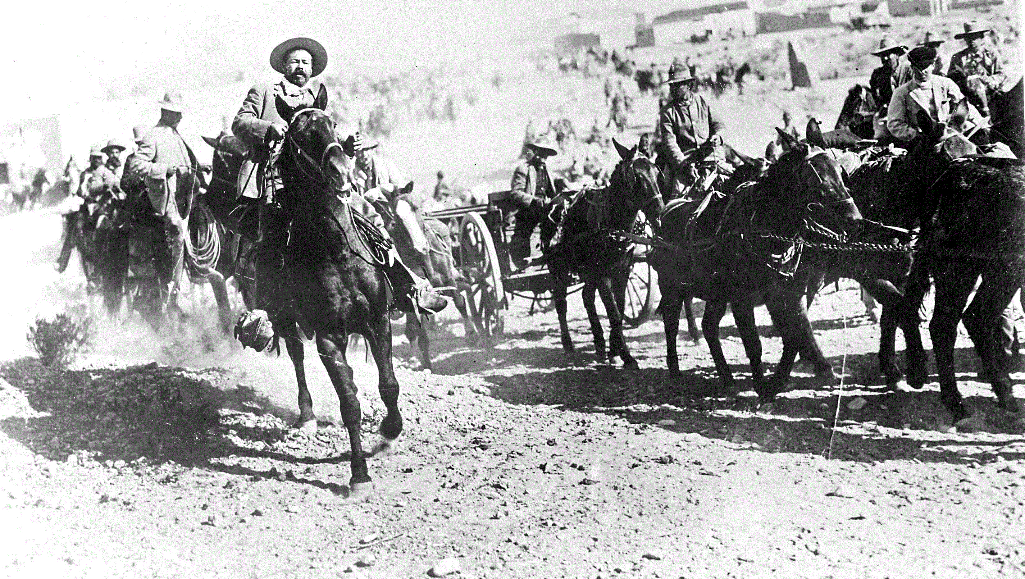 Francisco Villa auf seinem Hengst Sieben Meilen vor seiner División del Norte, nördlich von Ojinaga, Chihuahua